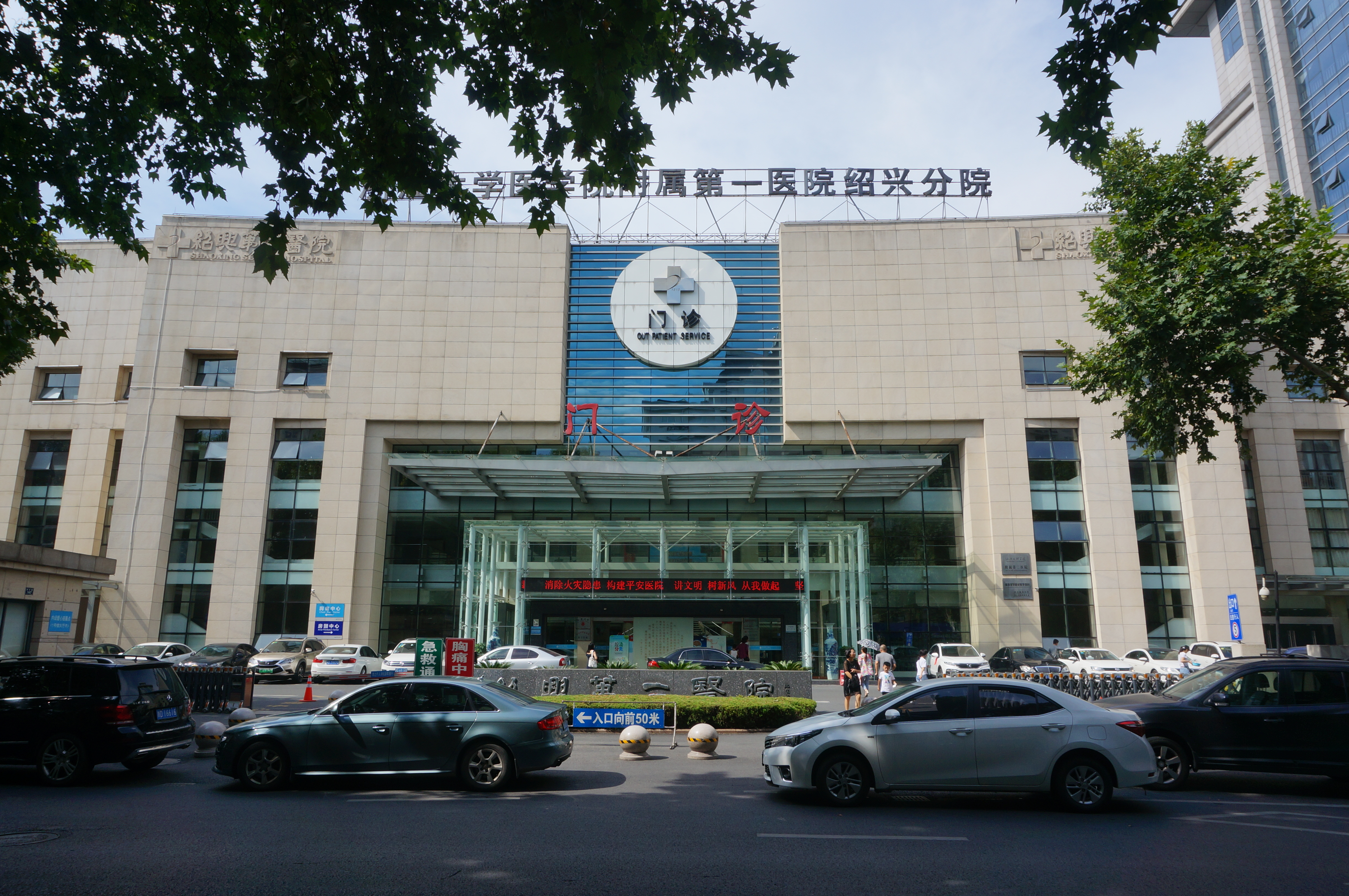 绍兴第二医院门诊楼南侧。